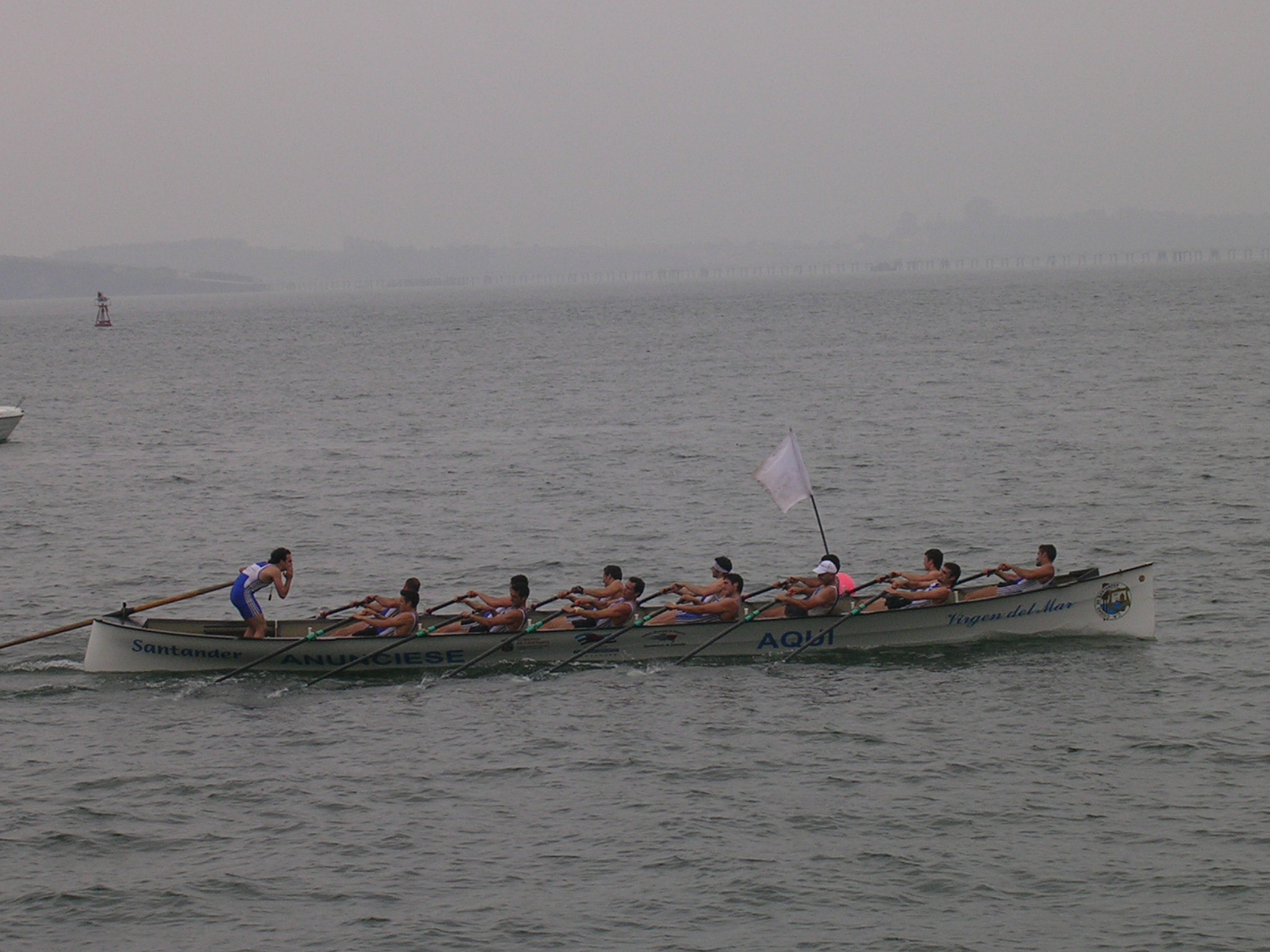 Santander en la llegada de la Bandera Sotileza 2006.